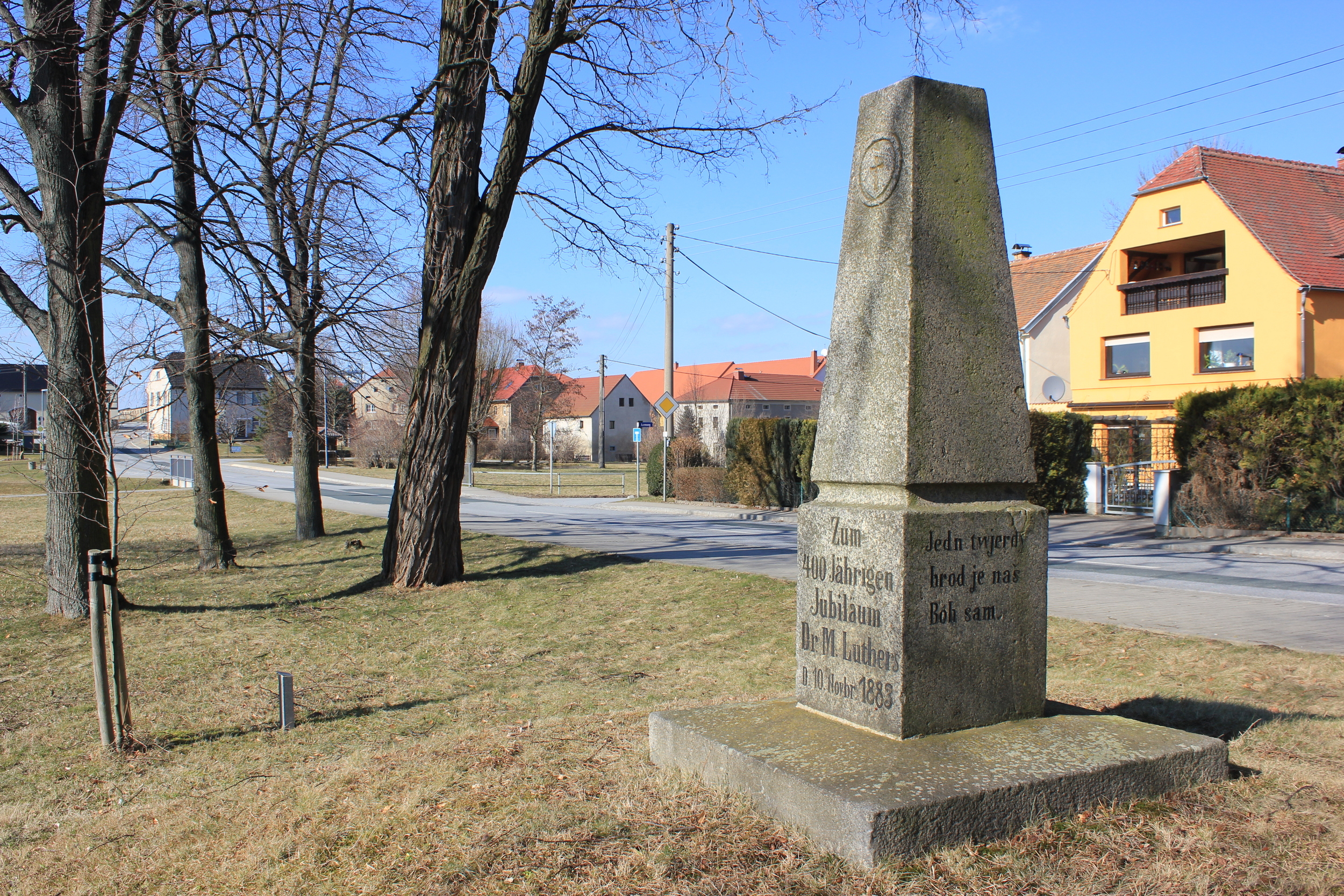 Hornjoserbsce: Lutherowy kamjeń na nawsy w Hnašecach.